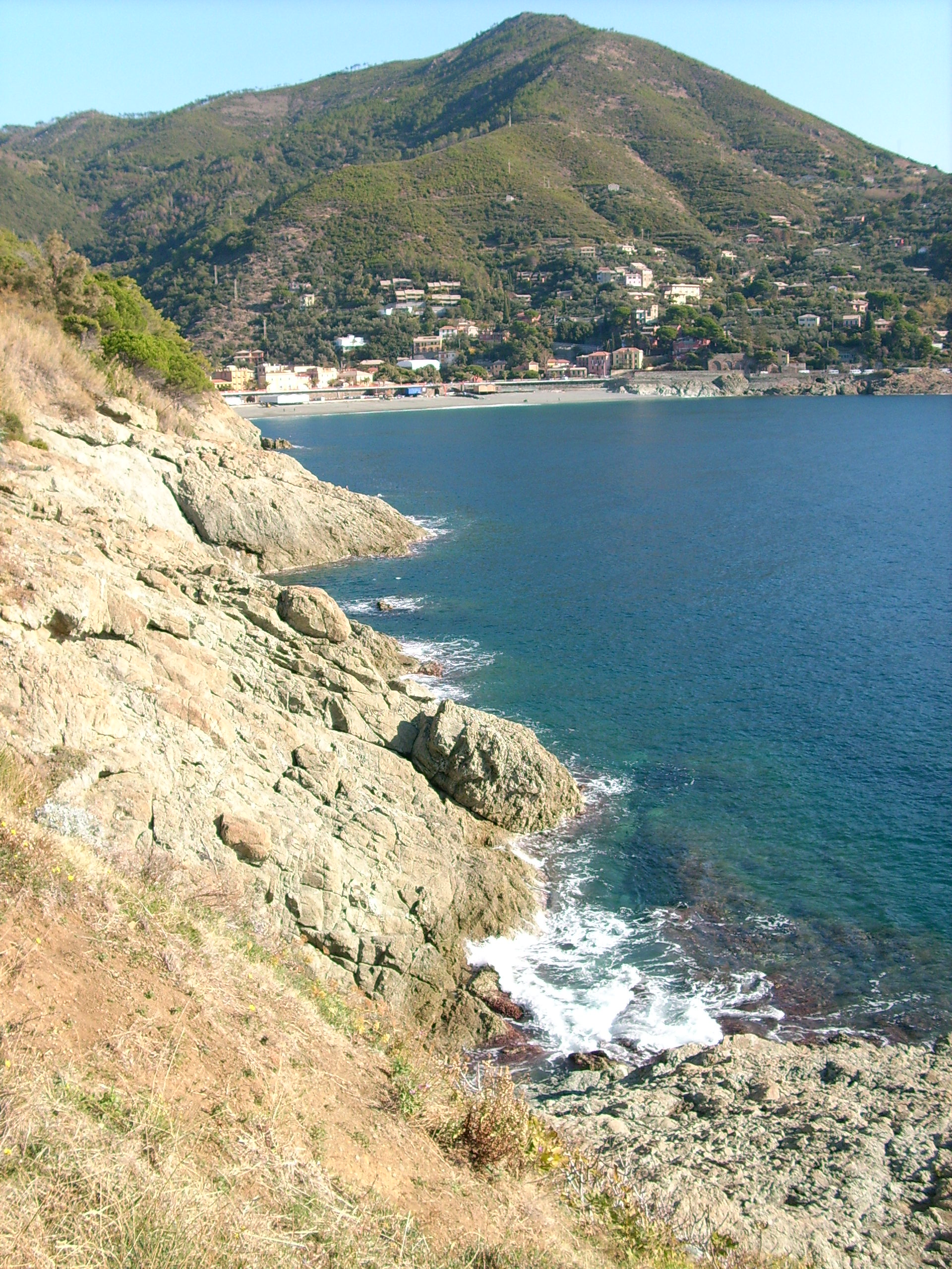 Bonassola, Liguria, Italia